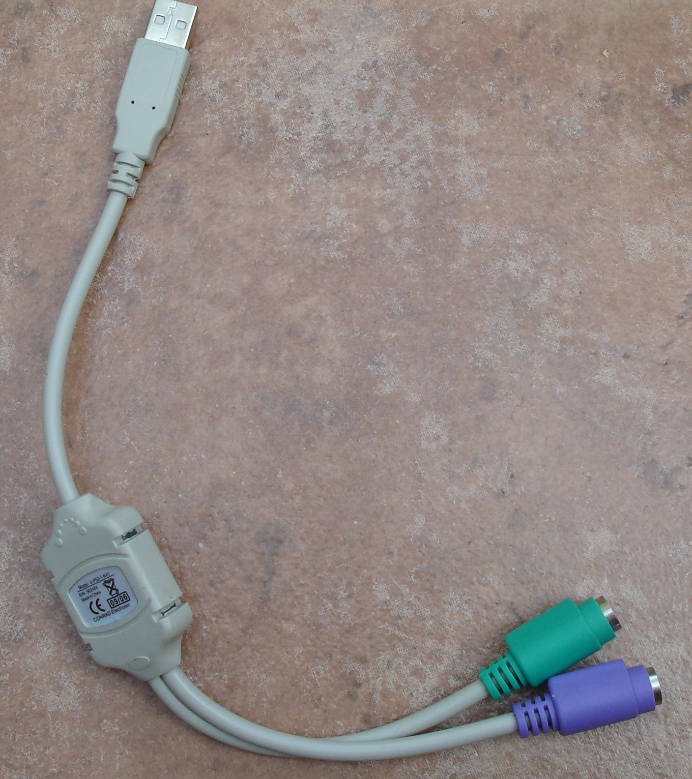 USB PS2 adapter